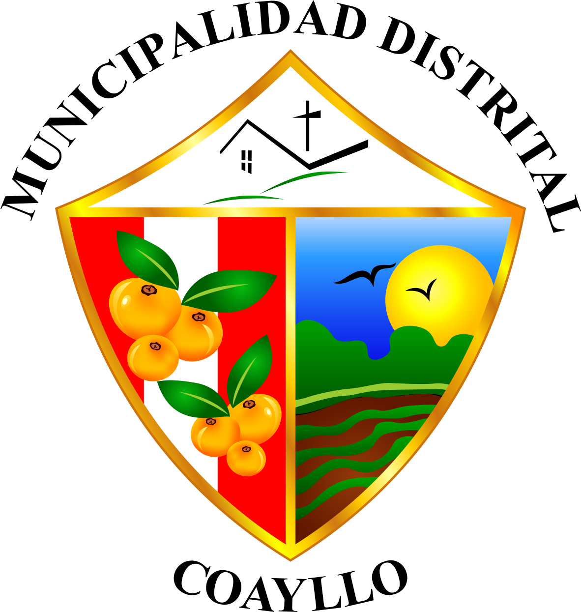 Distrito de Coayllo - Provincia de Cañete - Región Lima